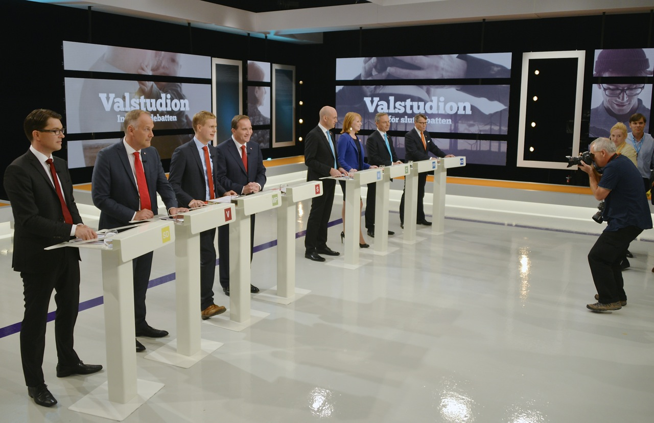 Slutdebatten i SVT den 12 september 2014 två dagar före valet.